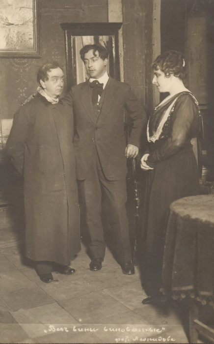 Малый театр "Без вины виноватые": В. А. Сашин в роли Шмаги, А. А. Остужев в роли Незнамова, Н. А. Смирнова в роли Кручининой